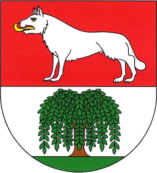 Znak obce Lkáň